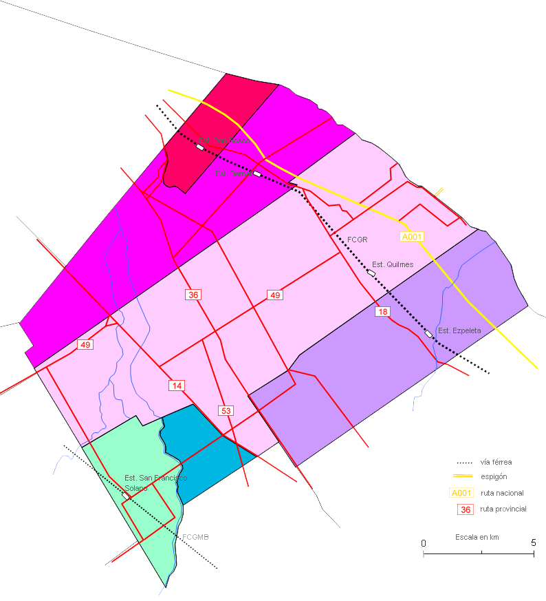 Localidades del Partido de Quilmes según criterio censal del INDEC